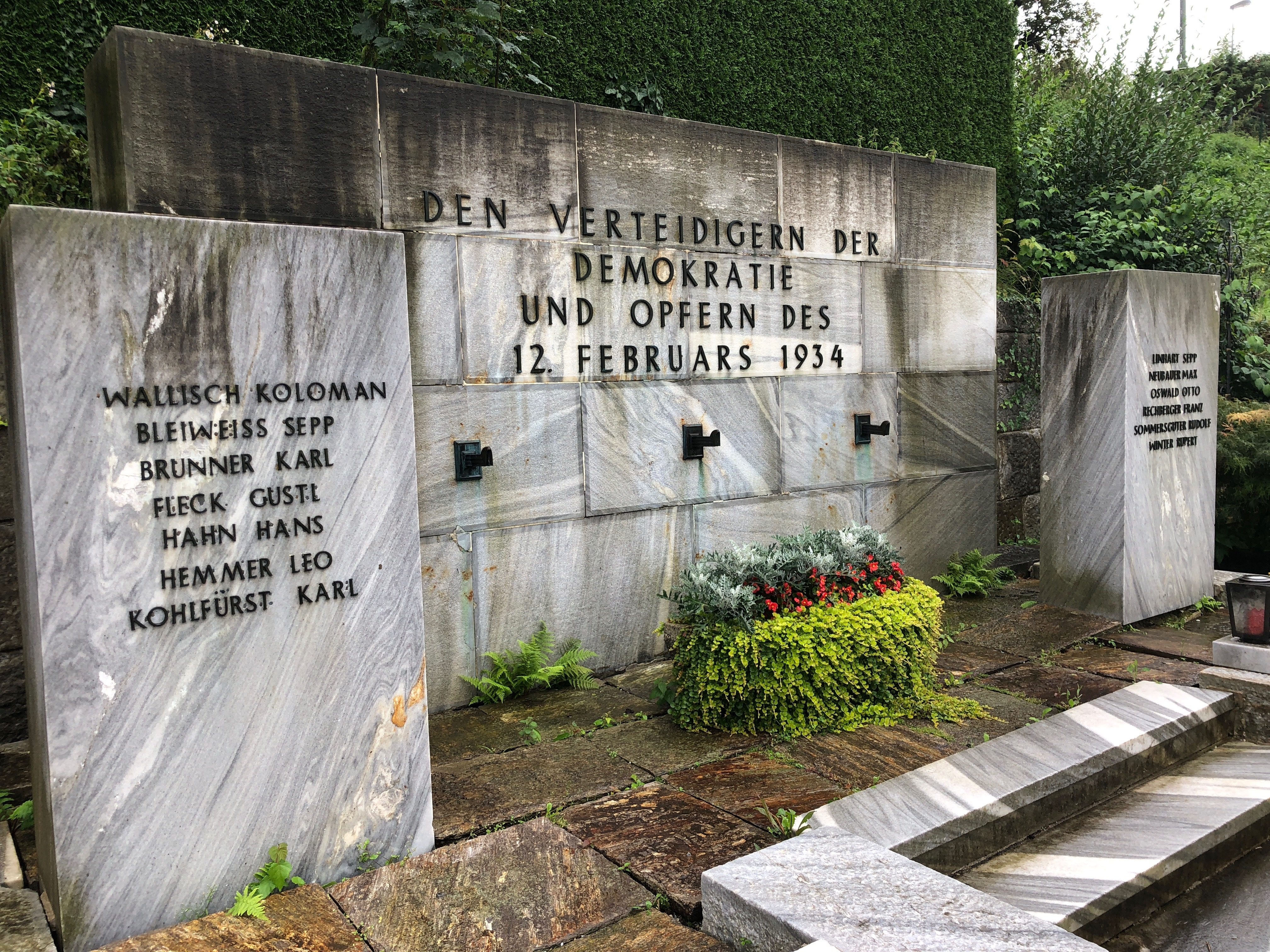 Bruck an der Mur, Friedhof St. Ruprecht (Heubergstraße 1, 8600 Bruck an der Mur): Grabdenkmal für die Freiheitskämpfer mit der Inschrift „Den Verteidigern der Demokratie und Opfern des 12. Februars 1934“. Es wurde am 20. Februar 1949 zum Gedenken an die 13 im Zuge der Februarkämpfe in Bruck an der Mur getöteten Angehörigen des Republikanischen Schutzbundes enthüllt.